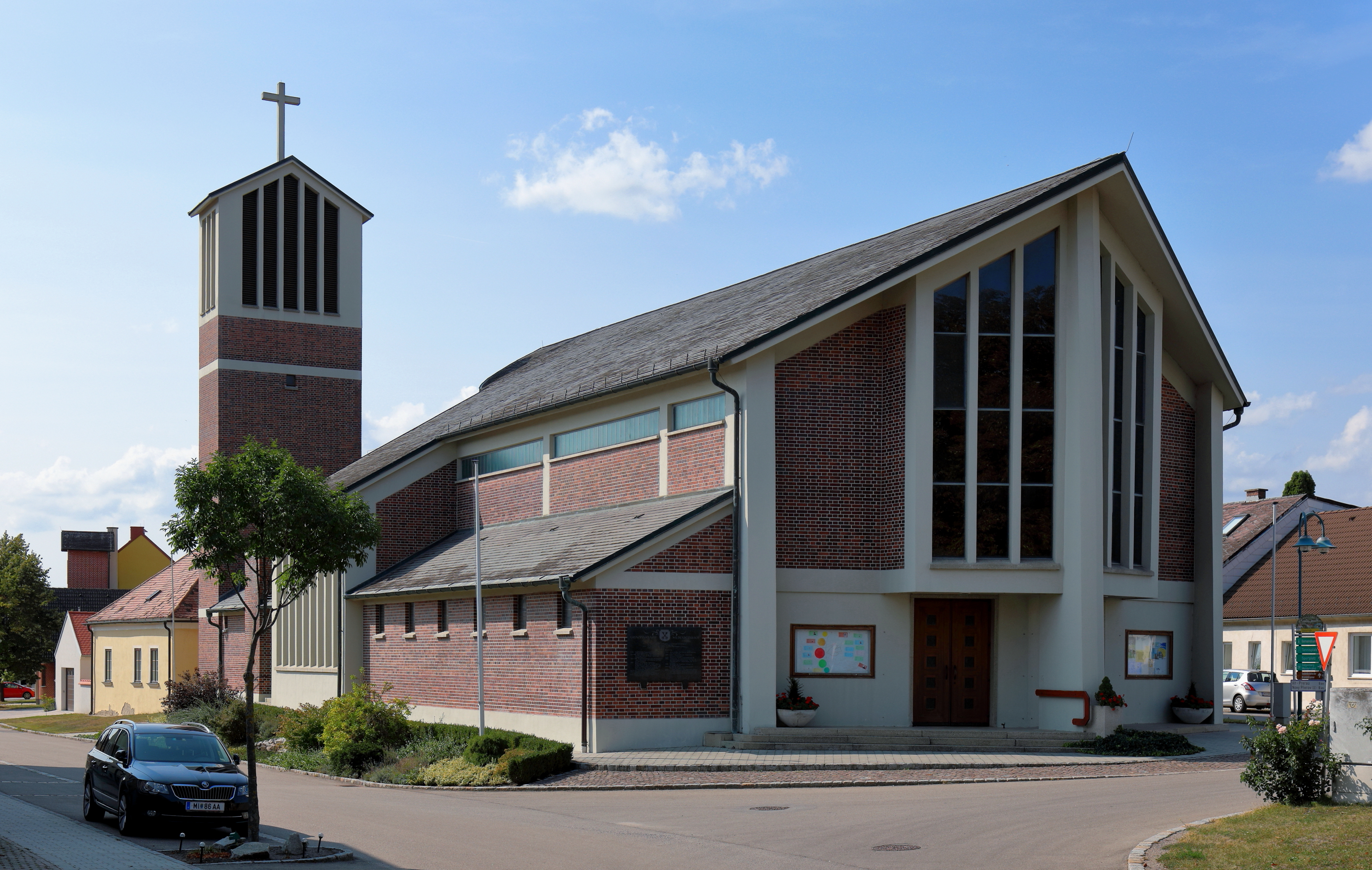 Ostsüdostansicht der röm.-kath. Pfarrkirche hl. Petrus in der niederösterreichischen Gemeinde Wildendürnbach.1971 erfolgte der Abbruch der alten Pfarrkirche und im Anschluß wurde nach Plänen des Architekten Hans Petermair die neue Pfarrkirche errichtet und am 28. September 1974 von Erzbischof Franz Jachym geweiht. Architektonisch ist der Stahlbetonbau kombiniert mit Klinkermauerwerke für die Region einmalig.